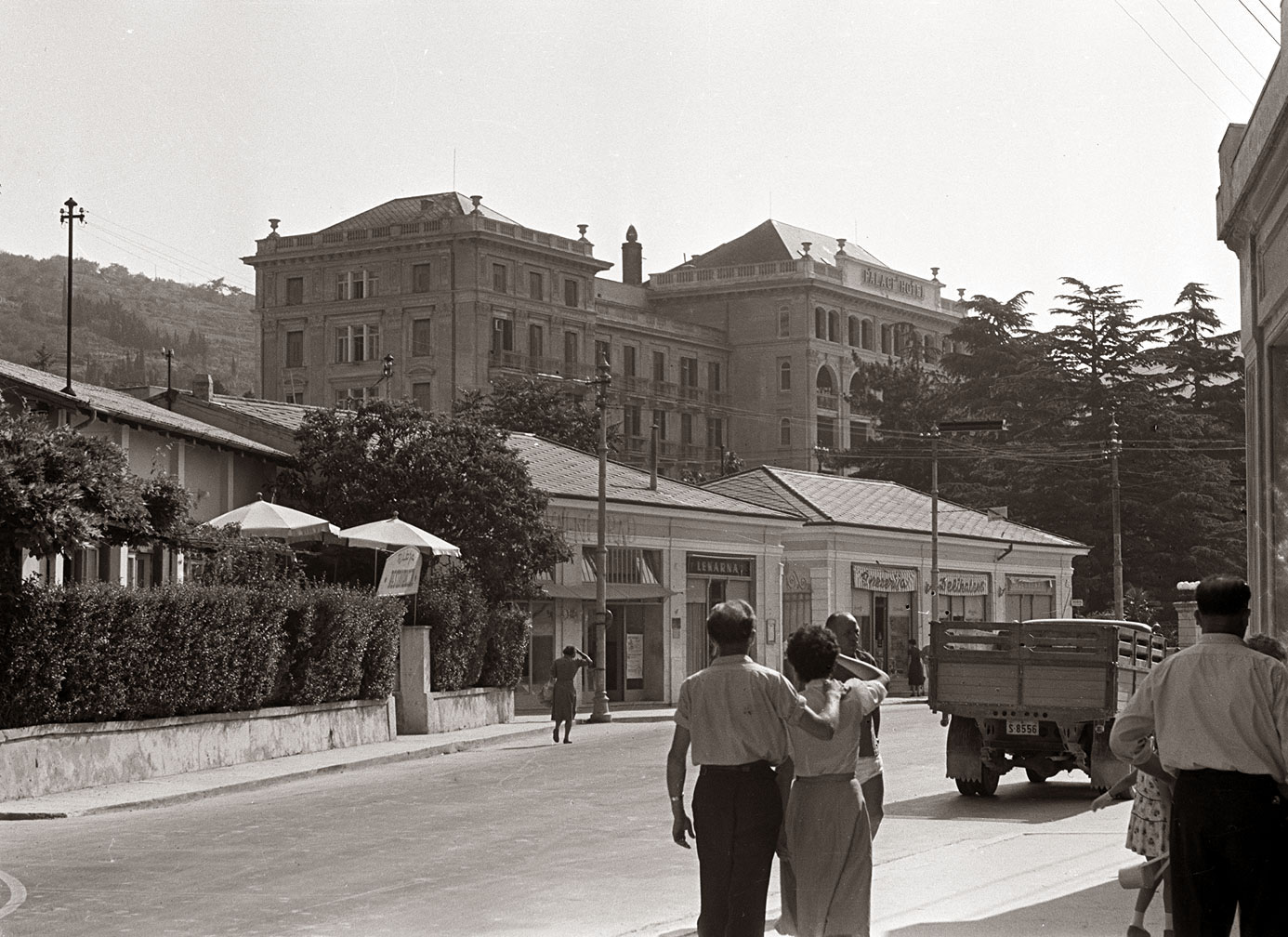 Portorož.